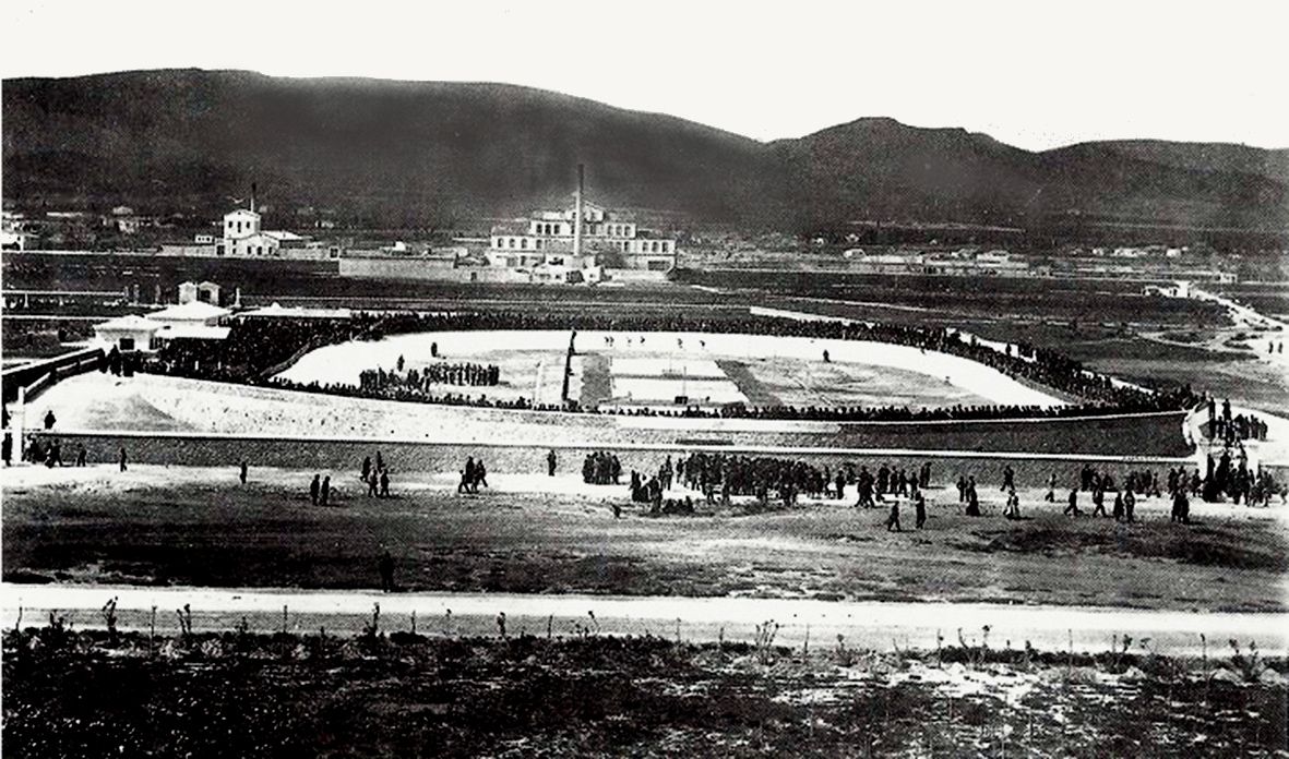 Το Ποδηλατοδρόμιο το 1896, στο σημείο που βρίσκεται σήμερα το Γήπεδο Καραϊσκάκη.